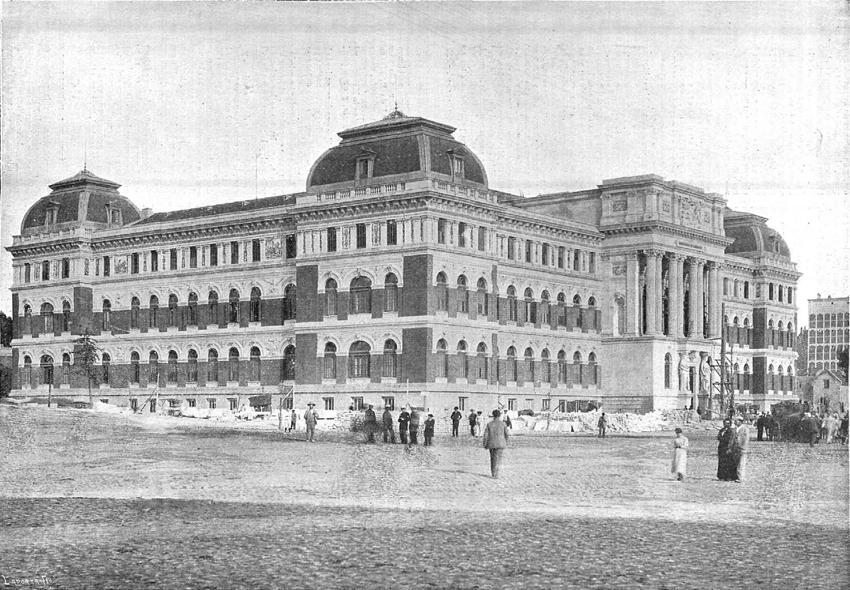 Madrid, el nuevo ministerio de Fomento, de fotografía de Christian Franzen, en la revista española La Ilustración Española y Americana.